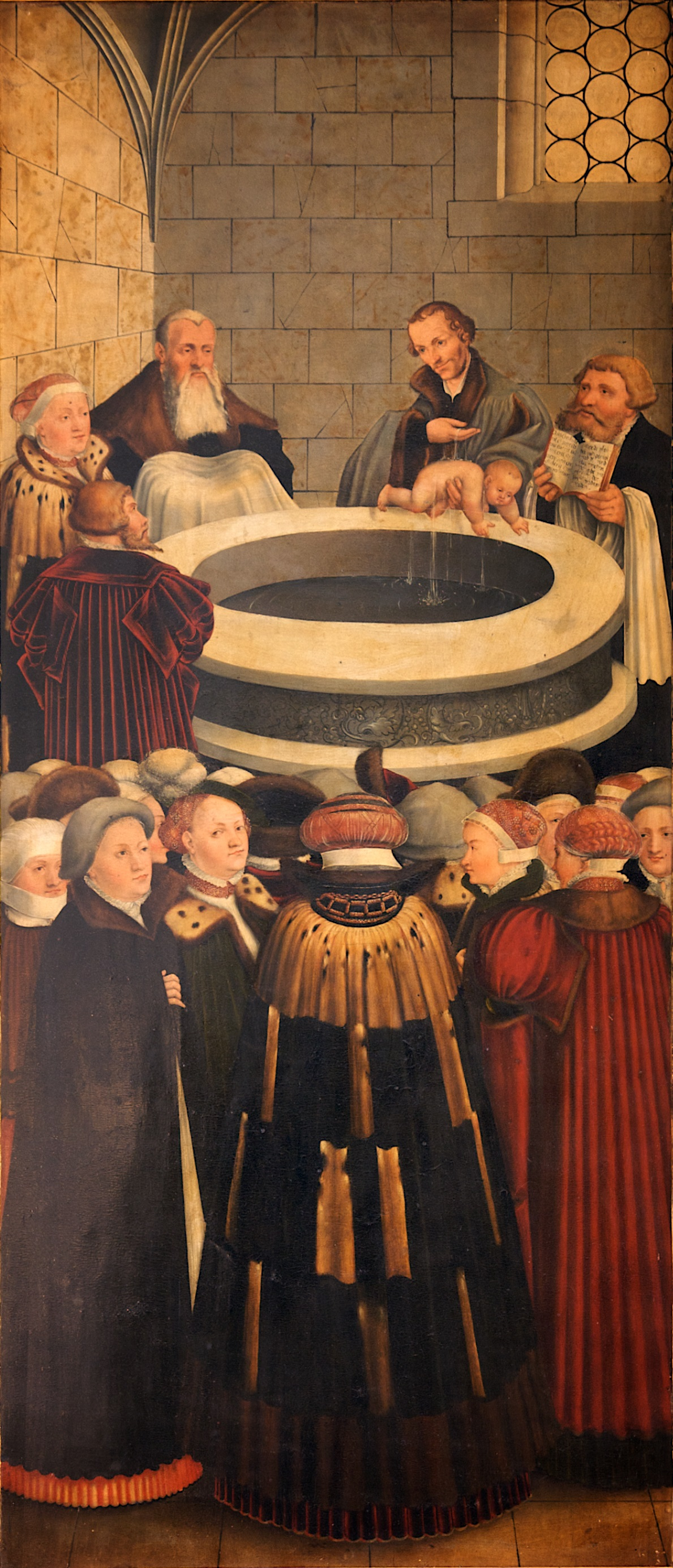 Reformation altarpiece, Stadt- und Pfarrkirche St. Marien zu Wittenberg, left wing